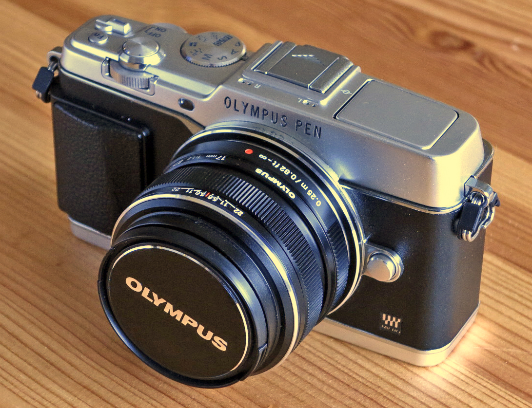 Olympus PEN E-P5 Front with 17/1.8 Lens